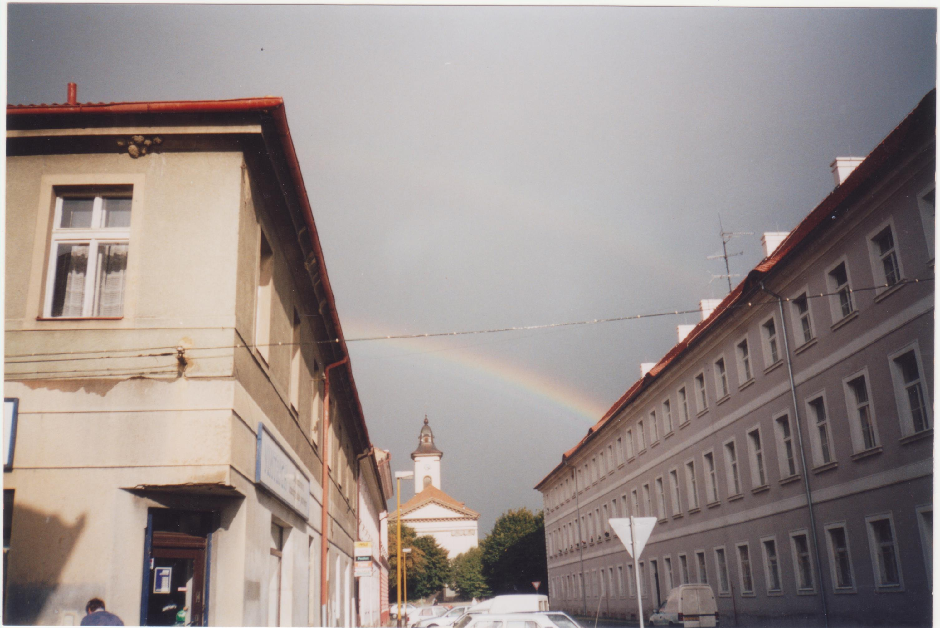 רחוב בטרזיינשטט